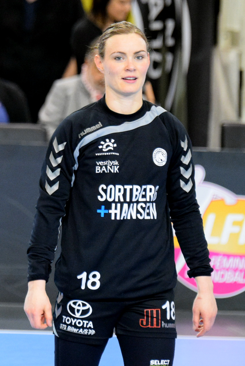 Jette Hansen Le 03 avril 2016 lors du match aller de demi-finale de la Coupe des vainqueurs de coupe de handball Issy Paris Hand / Team Tvis Holstebro